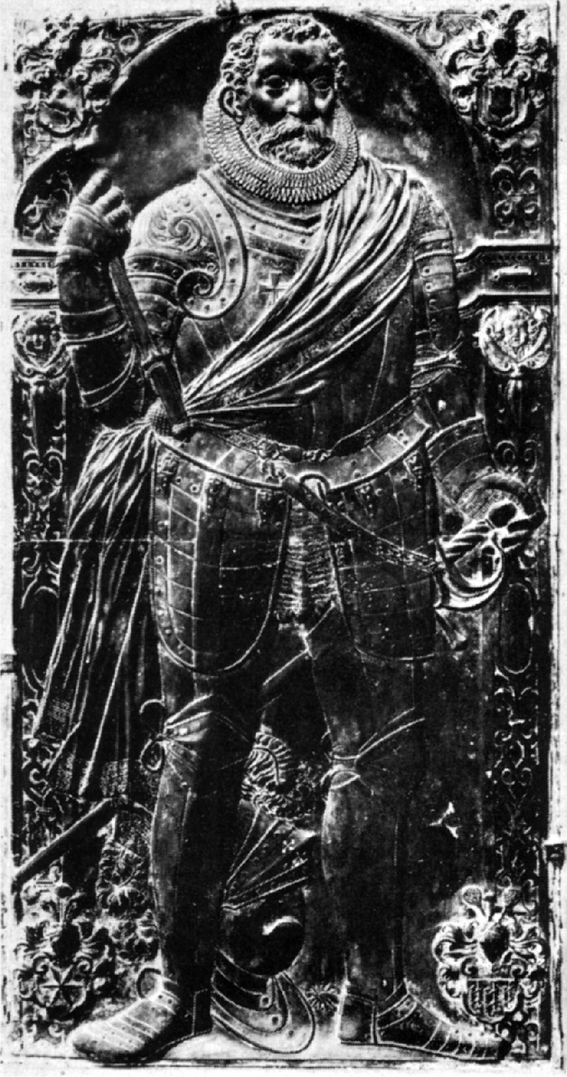 Hans von Lossow (* 1523; † 1605), Landkomtur der Ballei Sachsen des Deutschen Ritter-Ordens.